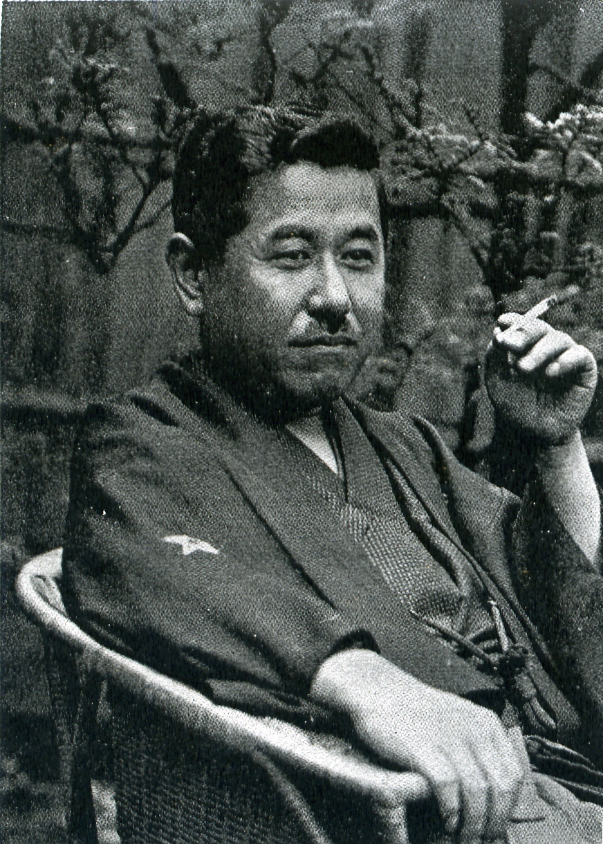 この写真は、長岡隆一郎（1884-1963）の写真です。